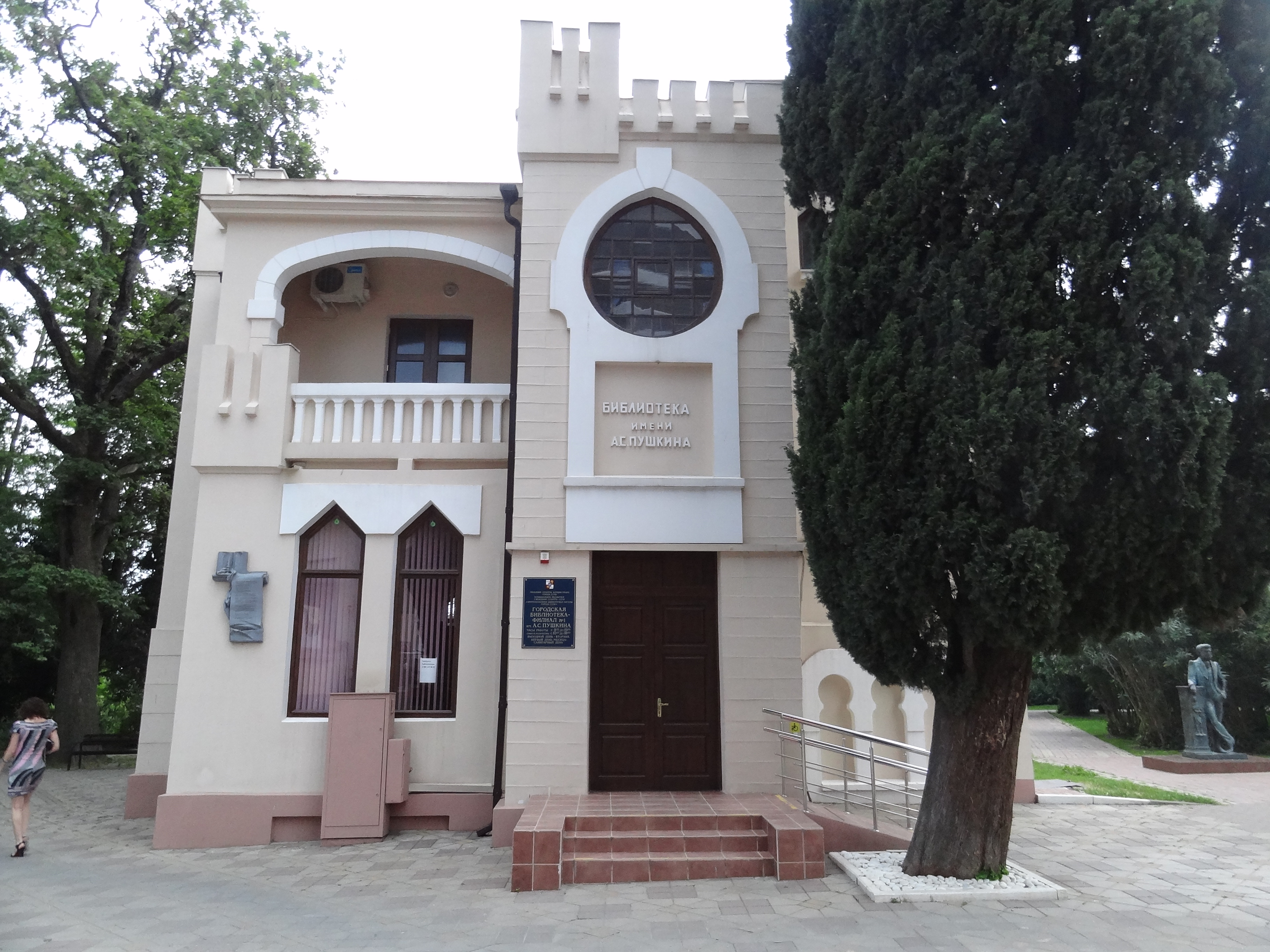 Библиотека имени А.С.Пушкина, Сочи, 2013 г.